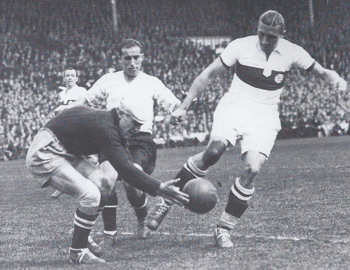 Photo de la finale de la coupe de France 1938-1939 opposant l'Olympique lillois au Racing Club de Paris et voyant la victoire du Racing 3-1. Ici le gardien de l'OL Julien Darui et le défenseur lillois Jules Vandoreen protègent la balle face à l'attaquant parisien Perez.